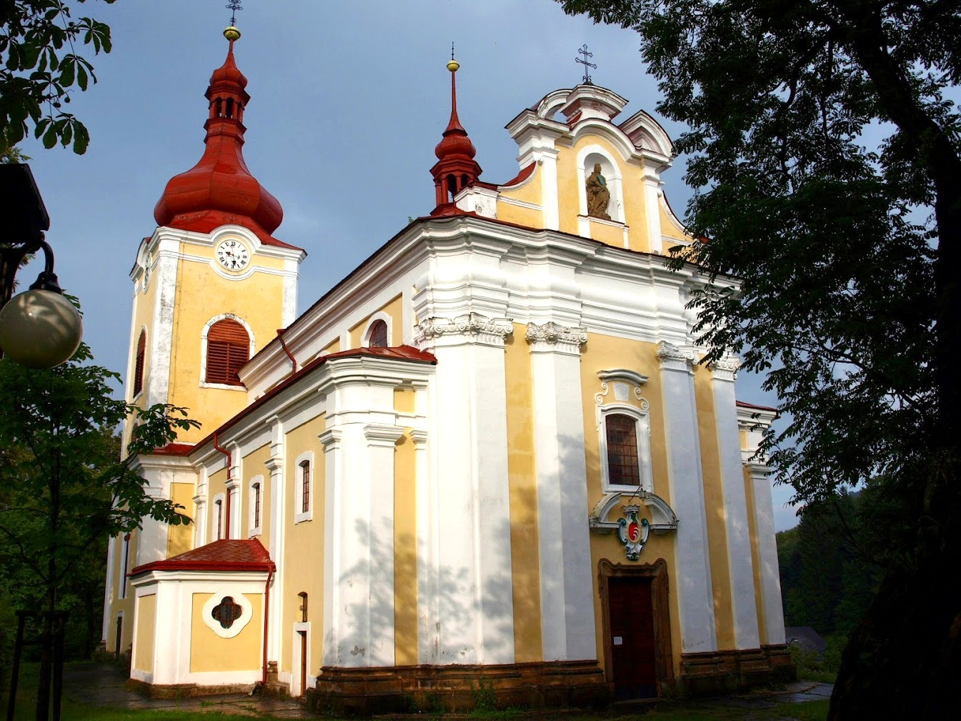 Kostel svaté Kateřiny ve Sloupu